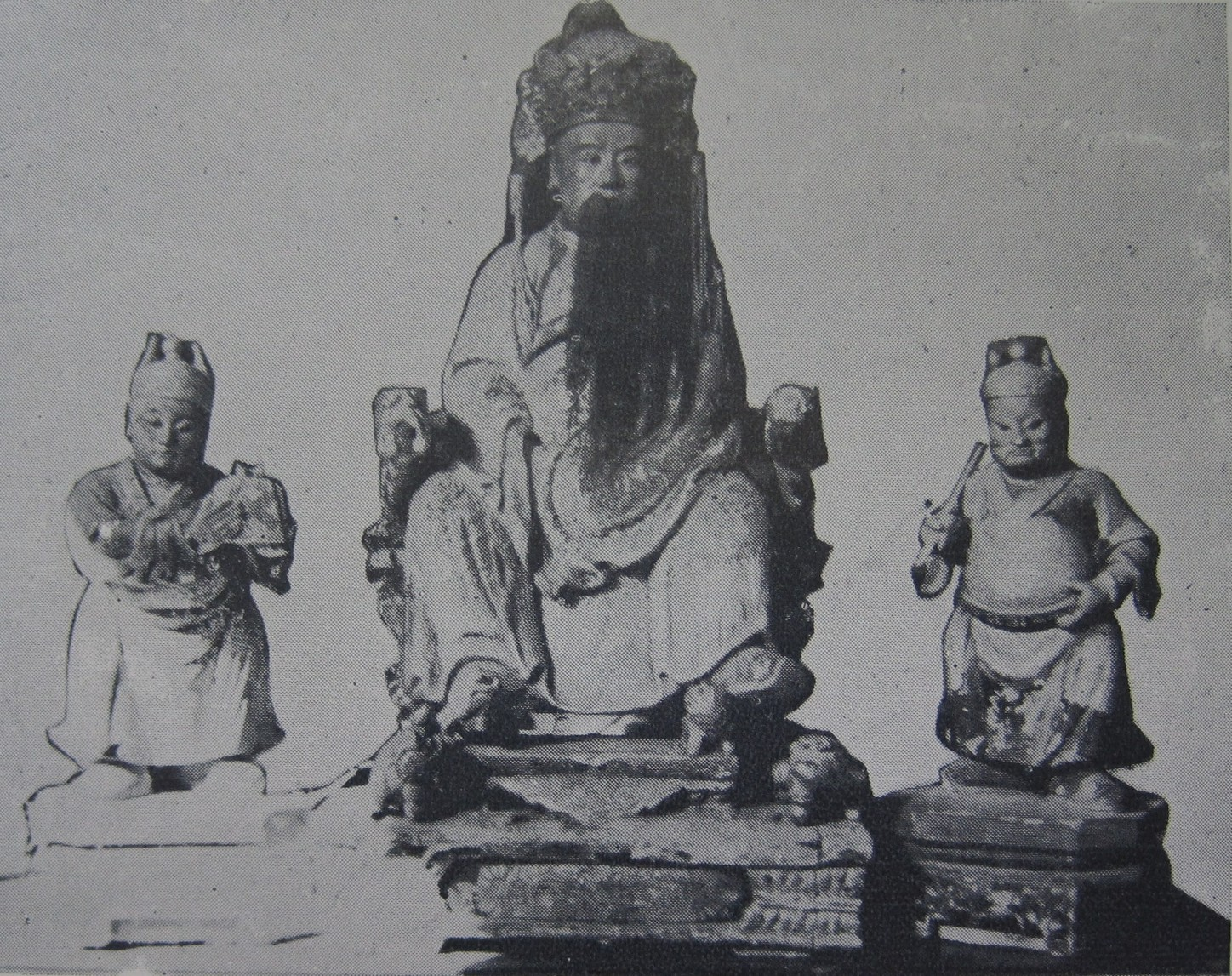 竹滬華山殿裡的明寧靖王朱術桂神像